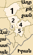 The regions of Nagorno-Karabakh Autonomous Oblast and Azerbaijan